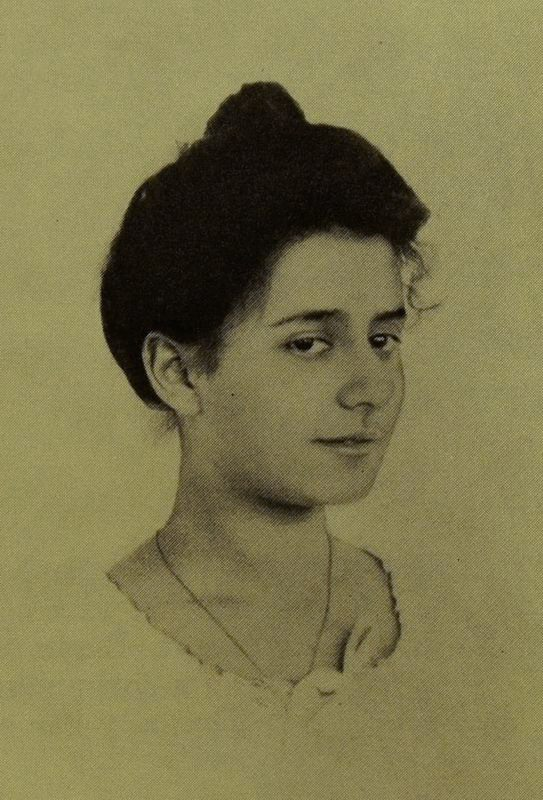 Шлёцер Татьяна (дочь профессора Ф.Ю.Шлёцера, сестра критика Бориса де Шлёцера, будущая вторая жена композитора Александра Скрябина)